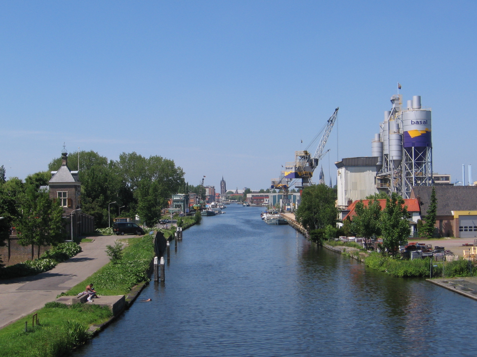 Delftse Schie seen from Kruithuisbrug, 11 juni